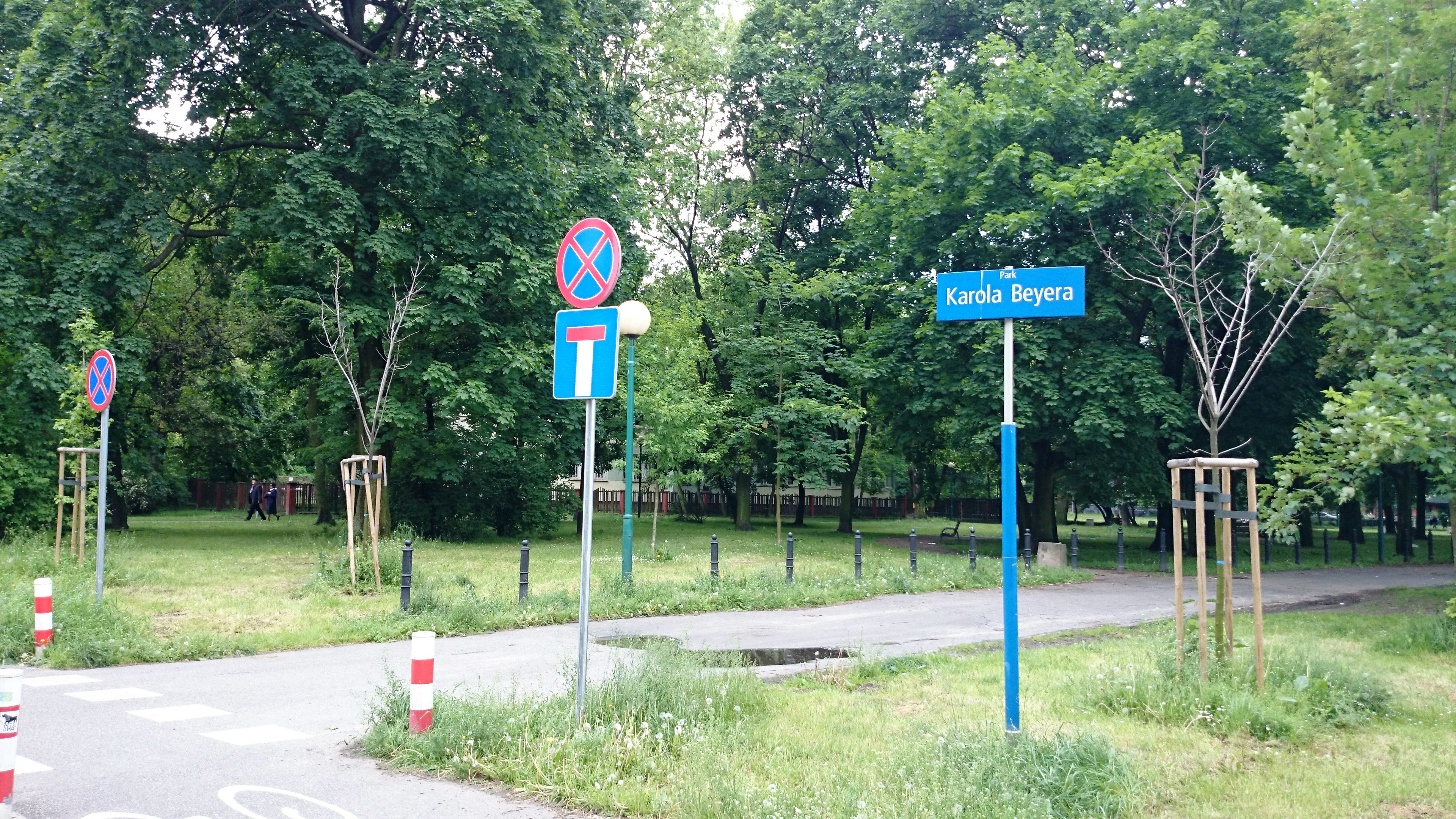 Kark im. Karola Beyera przy ul. Kruczkowskiego na Powiślu w Warszawie